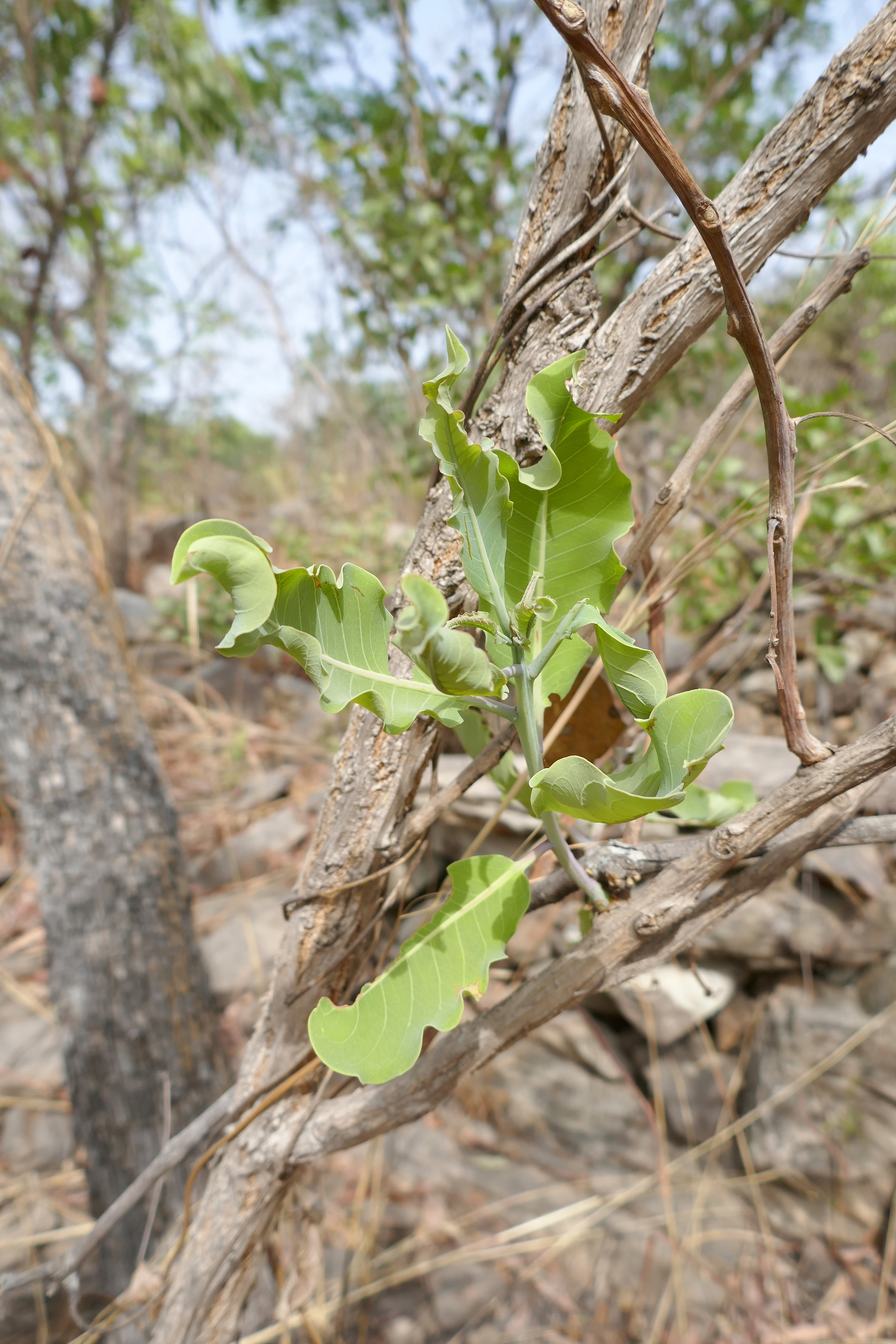 Terminalia mollis, au Bénin, dans l'Atakora, à proximité des chutes de Kota.